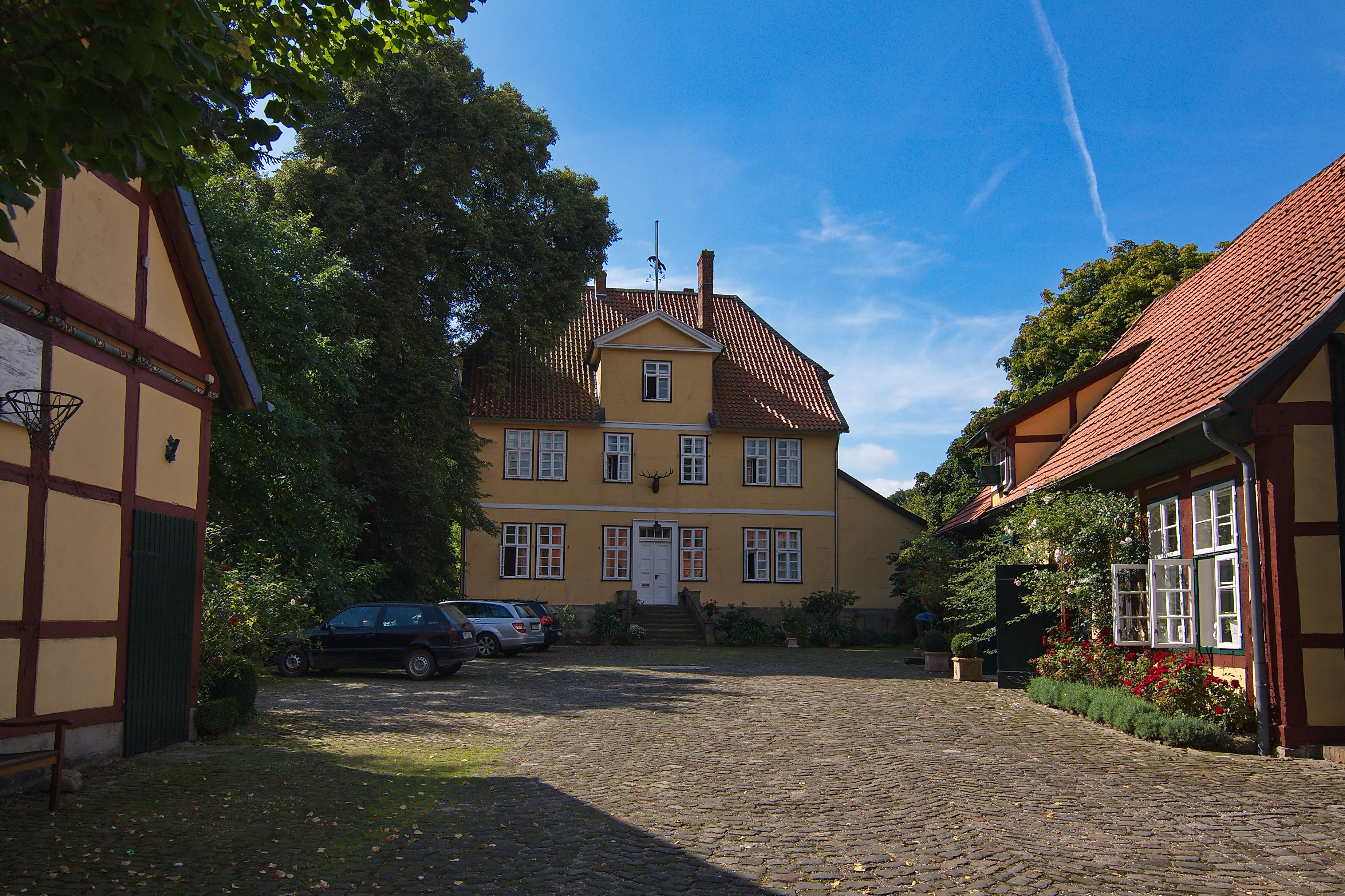 Ehemaliges Forstamt in Wennigsen, Niedersachsen, Deutschland